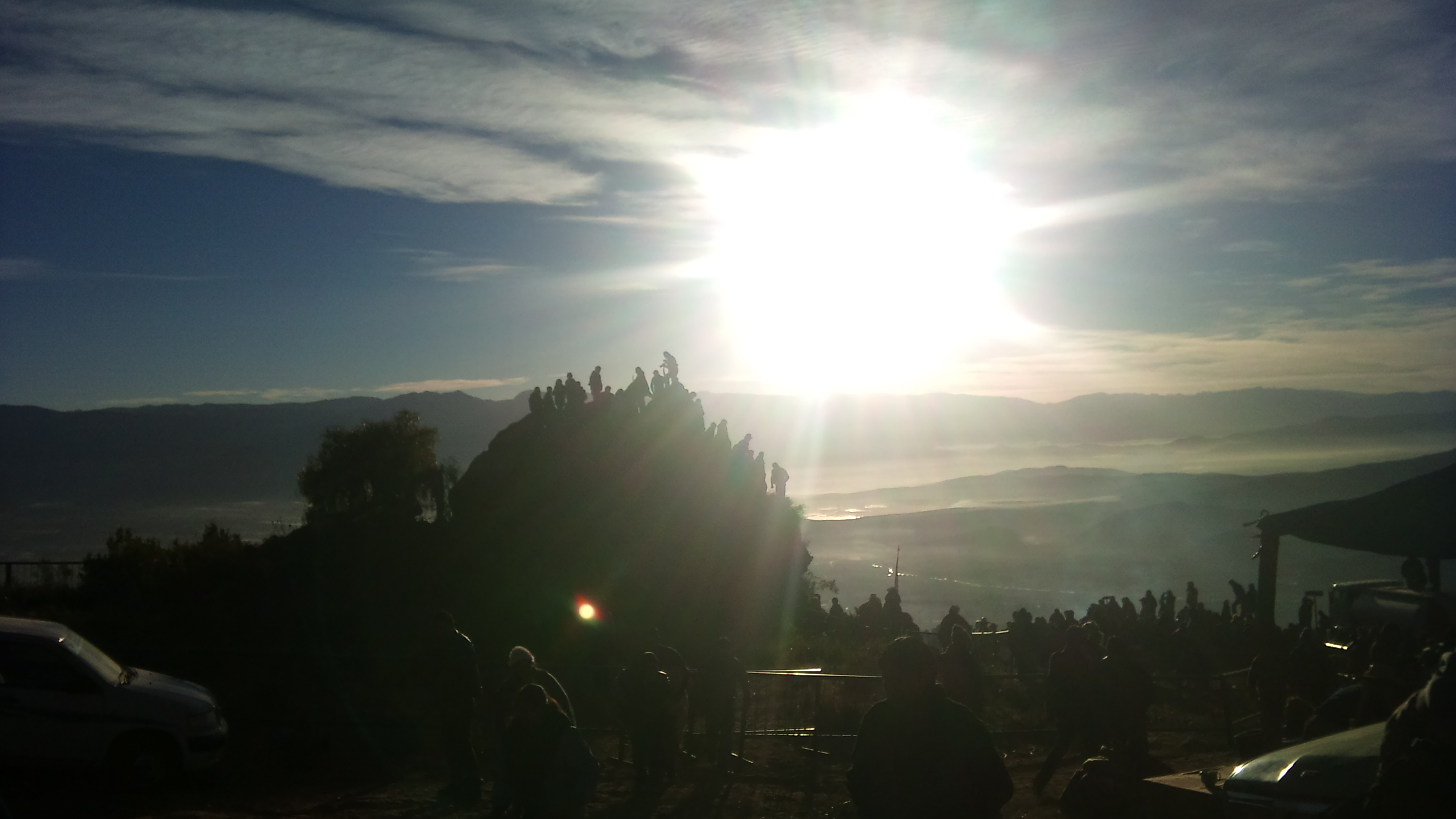 fotos de Bolivia